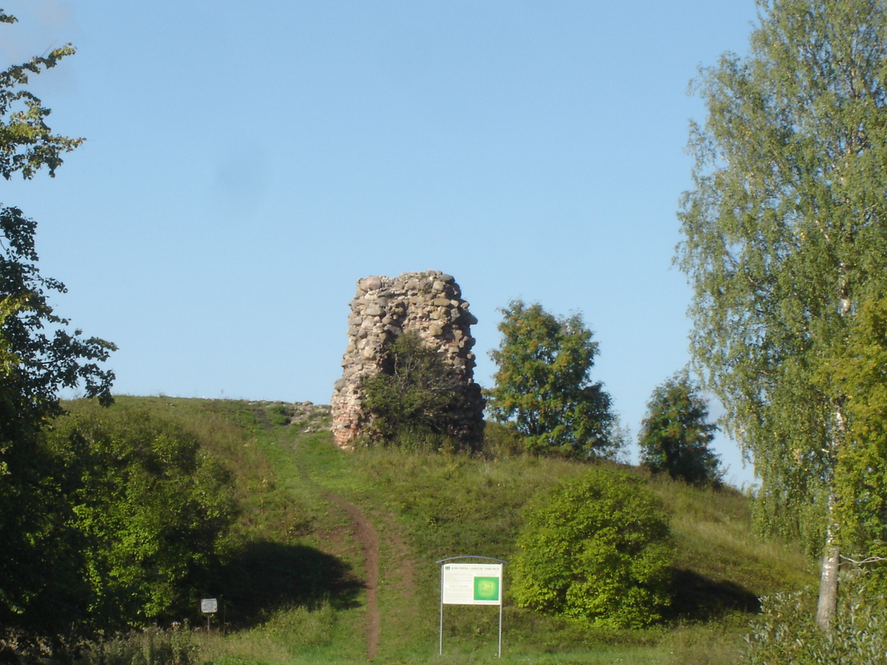 Kirumpää piiskopilinnus